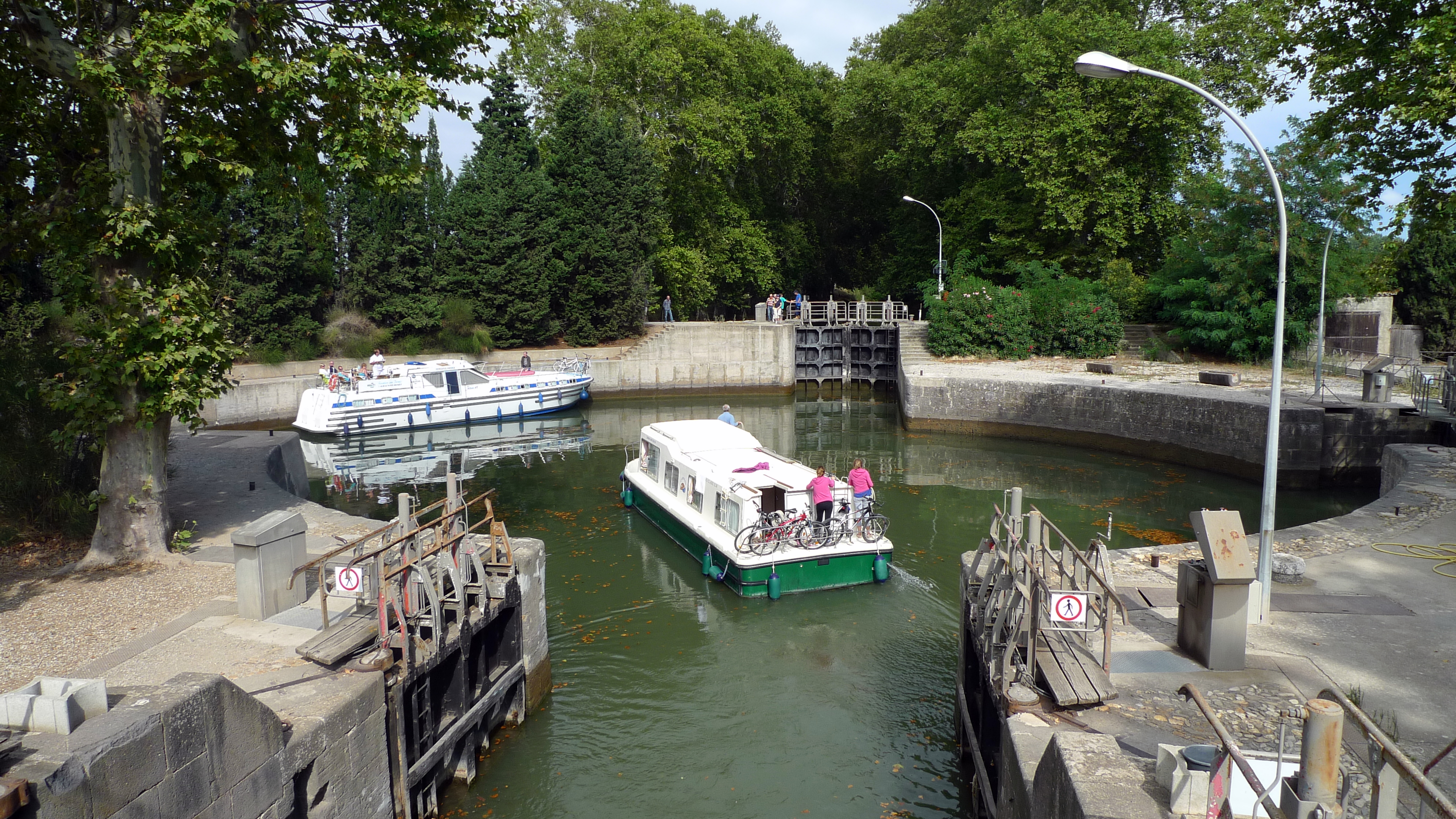 Ecluse ronde d'Agde